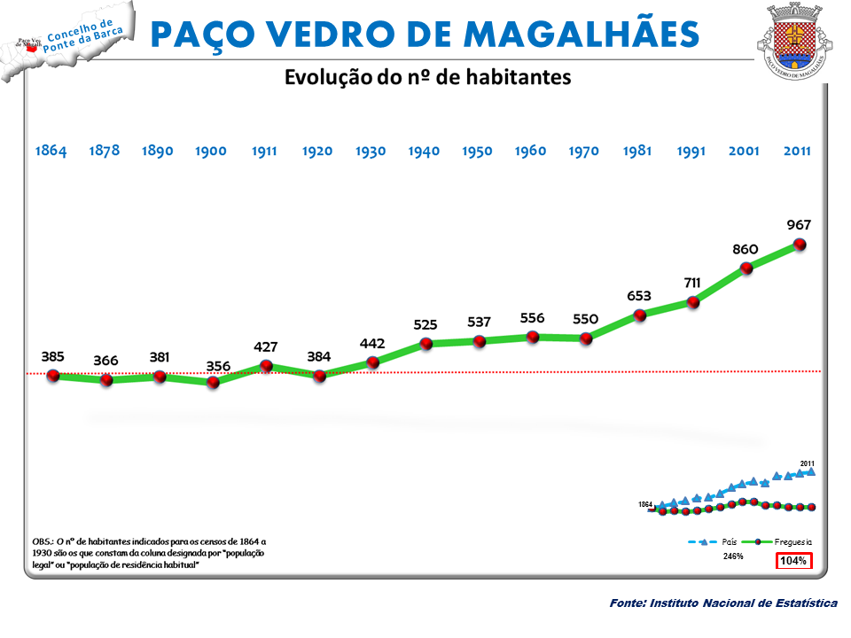 Censos 1864/2011